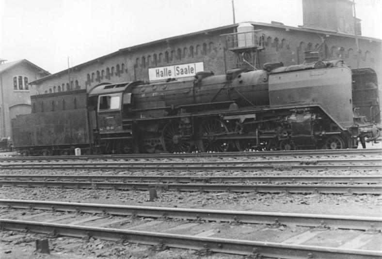 Dampflok 03 150 (BR 03) Zentralbild Schmidtke 7.8.1952 Lokomotivtypen der Deutschen Reichsbahn. UBz: Baureihe 03 am Bw Halle